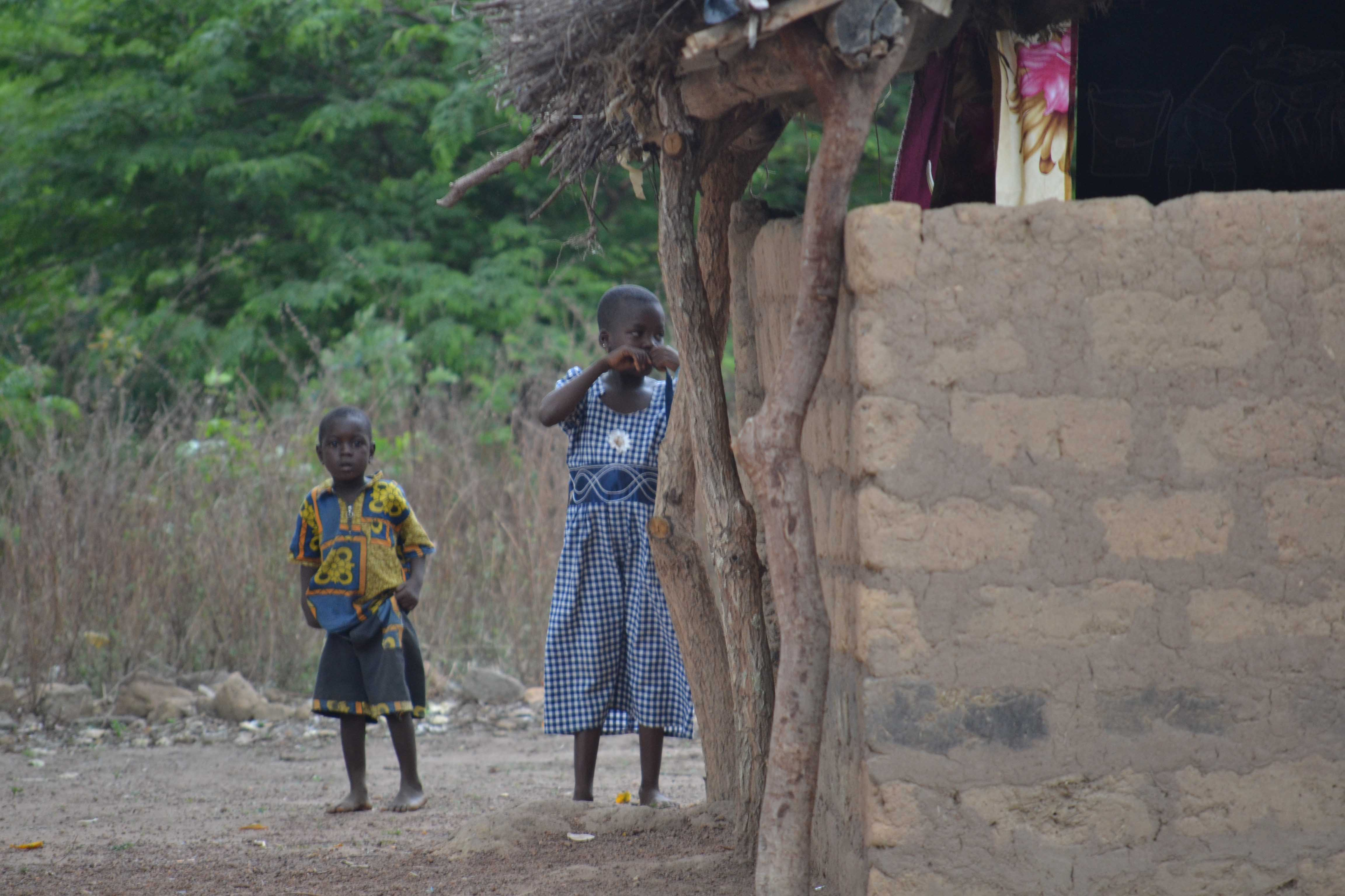 Une école primaire au nord de la Côte d'Ivoire ,zone Sinematiali